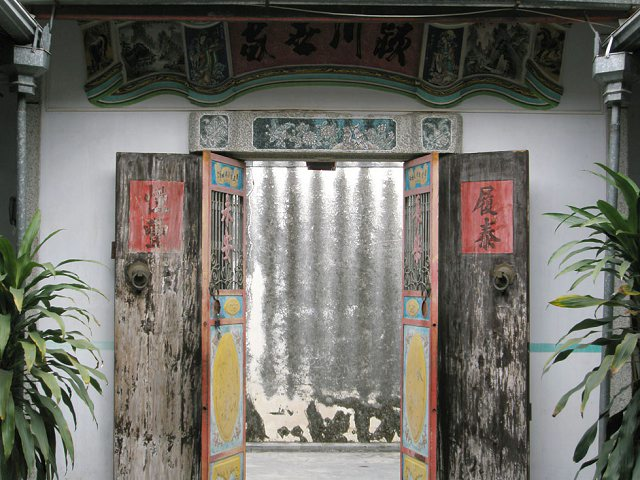 传统潮汕民居下山虎